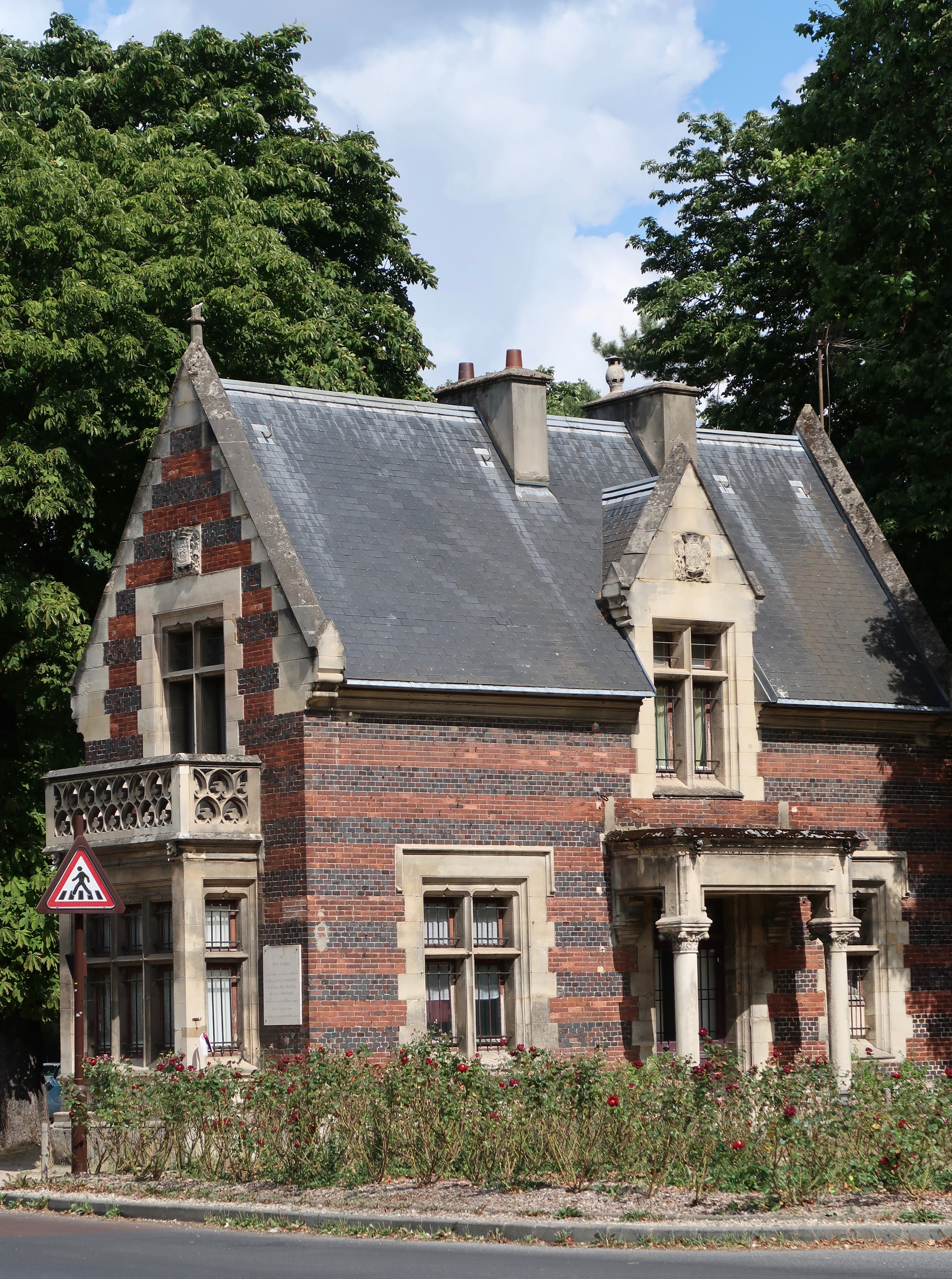 Anciens pavillons de garde du bois de Boulogne (Paris, 16e), au niveau du croisement du boulevard Maurice-Barrès et de l'avenue de Madrid à Neuilly-sur-Seine (Hauts-de-Seine). Architecte : Gabriel Davioud.